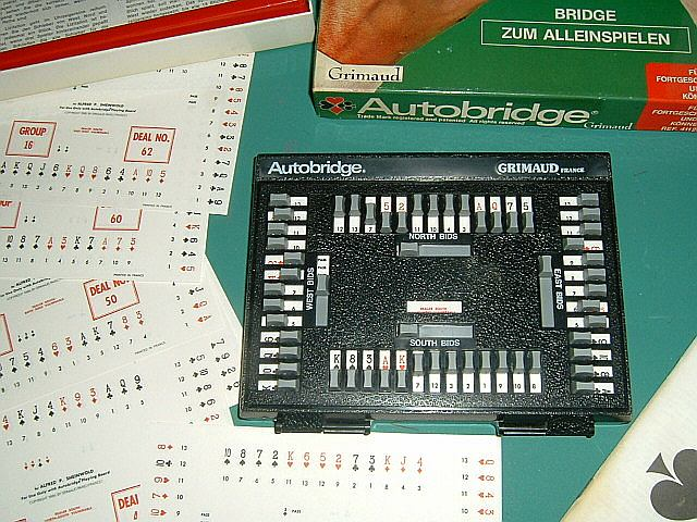 selbst fotografiert am 1.11.04, GNUFDL, Spiel in meinem Besitz --Peng 12:47, 14 June 2006 (UTC), Bild: Bridge zum Lernen, sogenanntes :Autobridge. Mittels eines Schiebemechanismus kann man bieten und ausspielen. Ein Beiheft erläutert die Partien. Lizenz